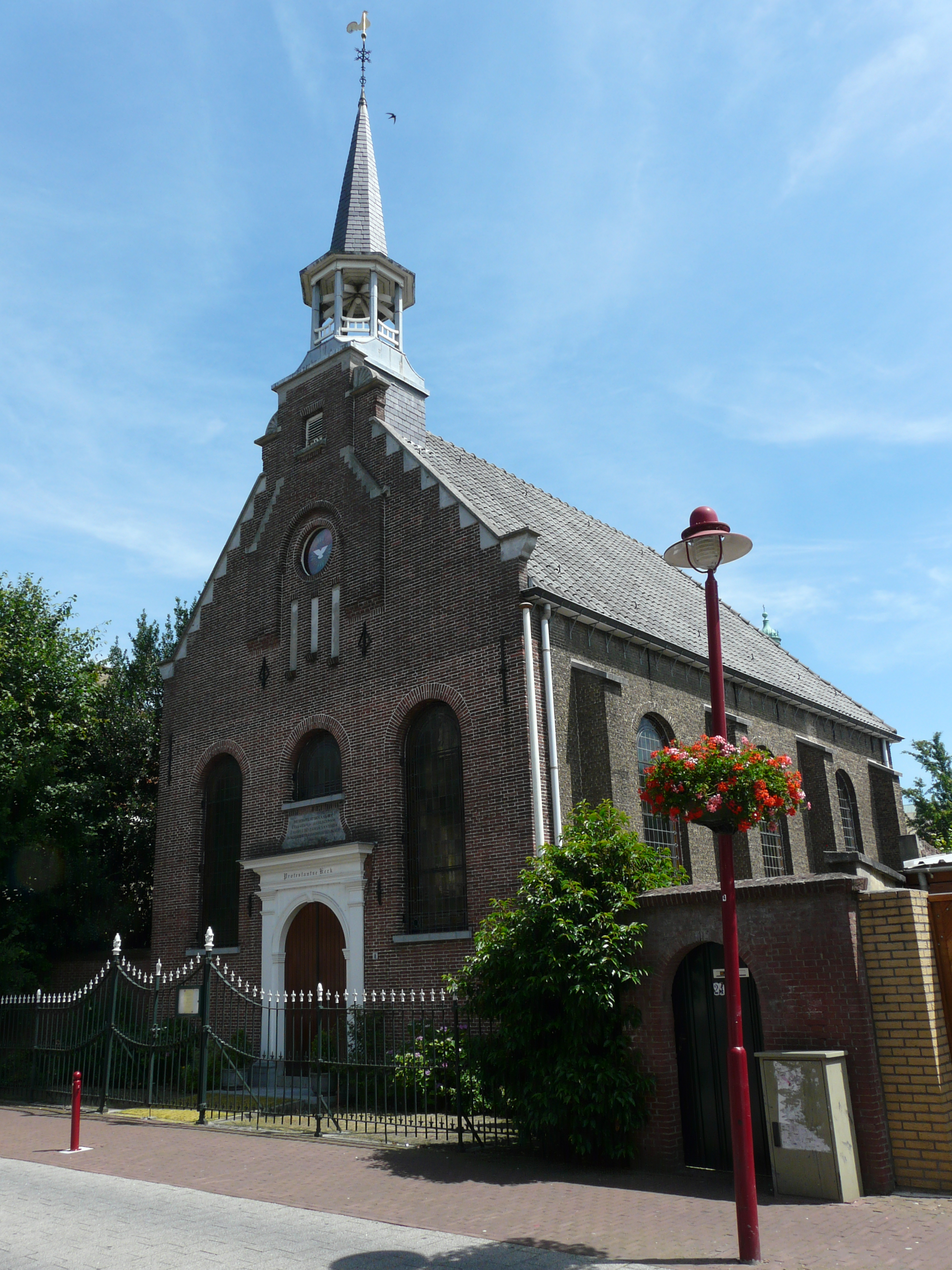 Hervormde kerk in de Fenkelstraat in Oudenbosch